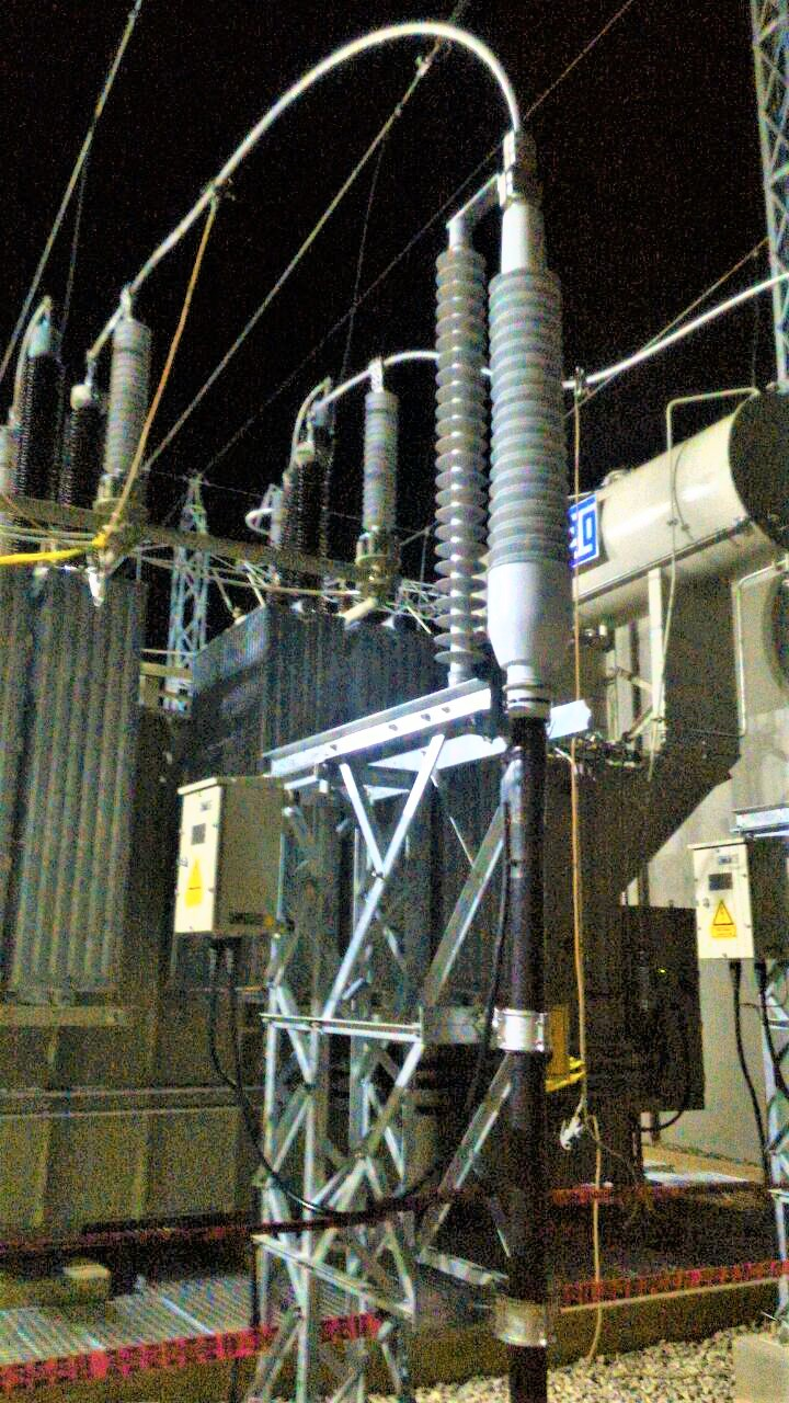 Instalación de terminal flexible en cable de alta tensión 123kV para alimentar un transformador en la subestación Cuestecitas